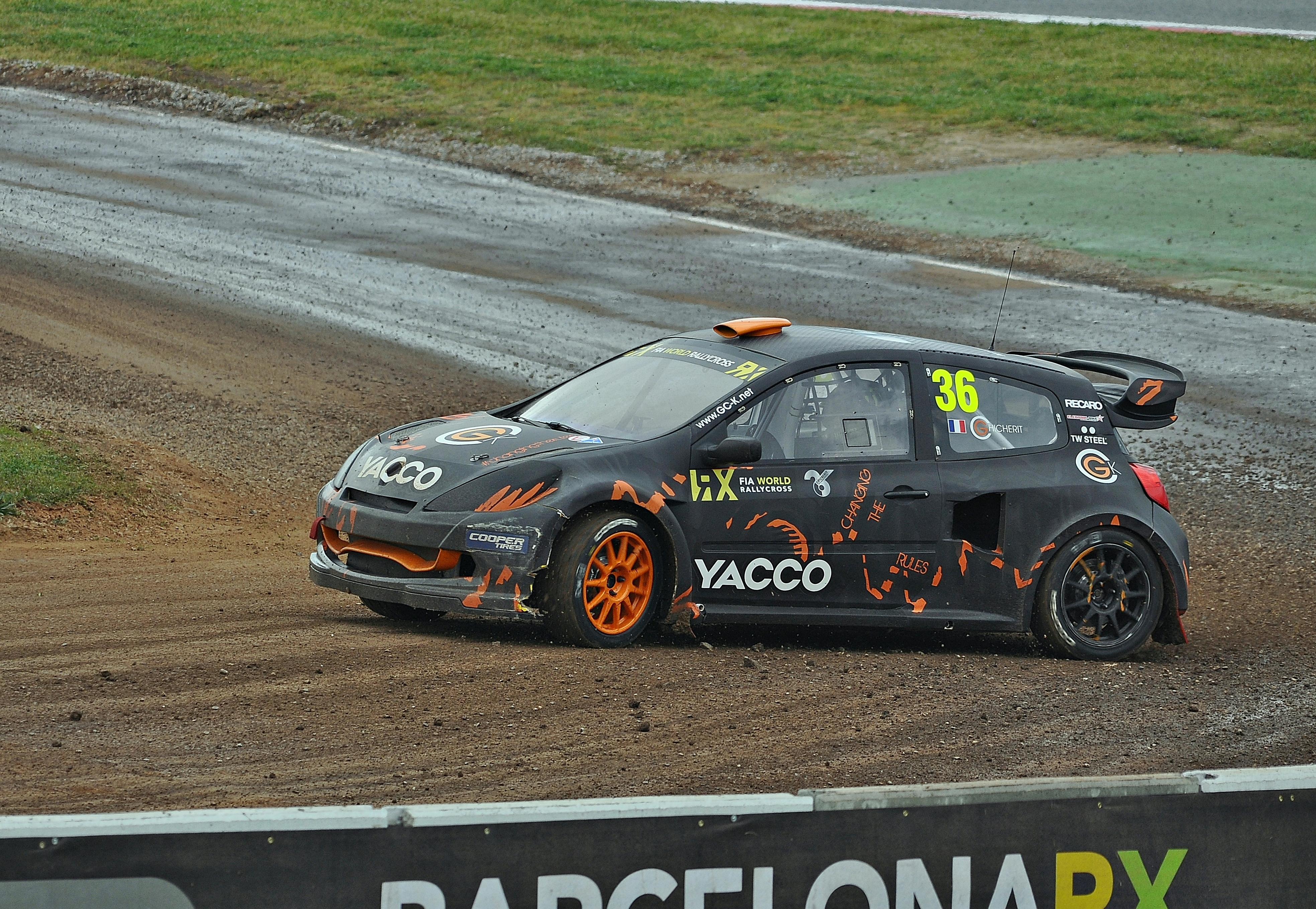 RX Barcelona